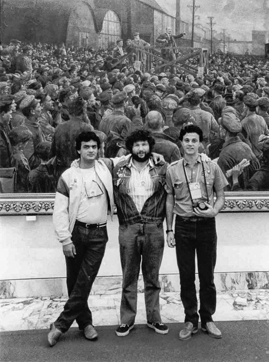 Aécio Neves e Sílvio Tendler - Congresso Internacional da Juventude - Moscou - 1985 - Aécio Neves foi nomeado presidente da Comissão do Ano Internacional da Juventude. Ele chefiou a delegação brasileira no Congresso Internacional da Juventude, em Moscou.